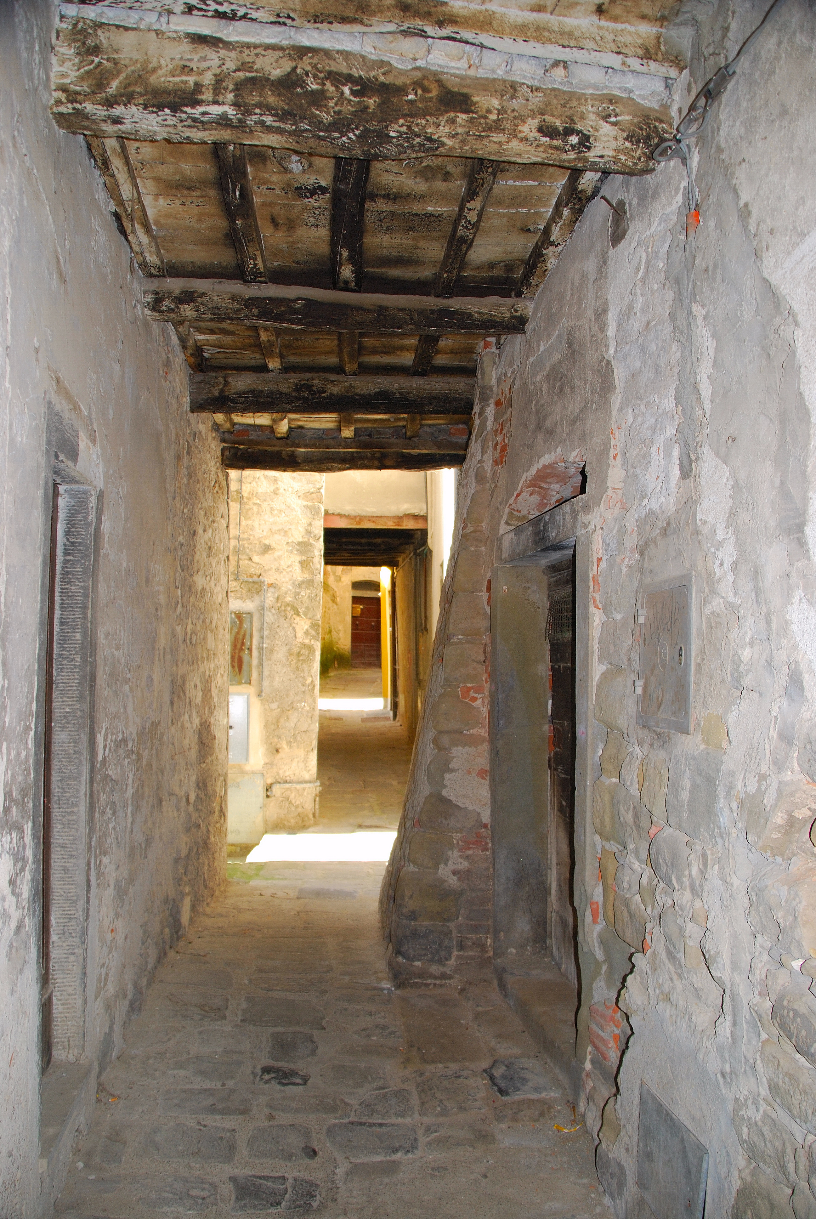 Loro Ciuffenna